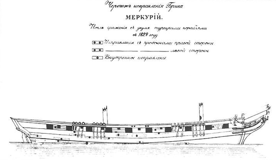 Схема повреждений корпуса брига «Меркурий»